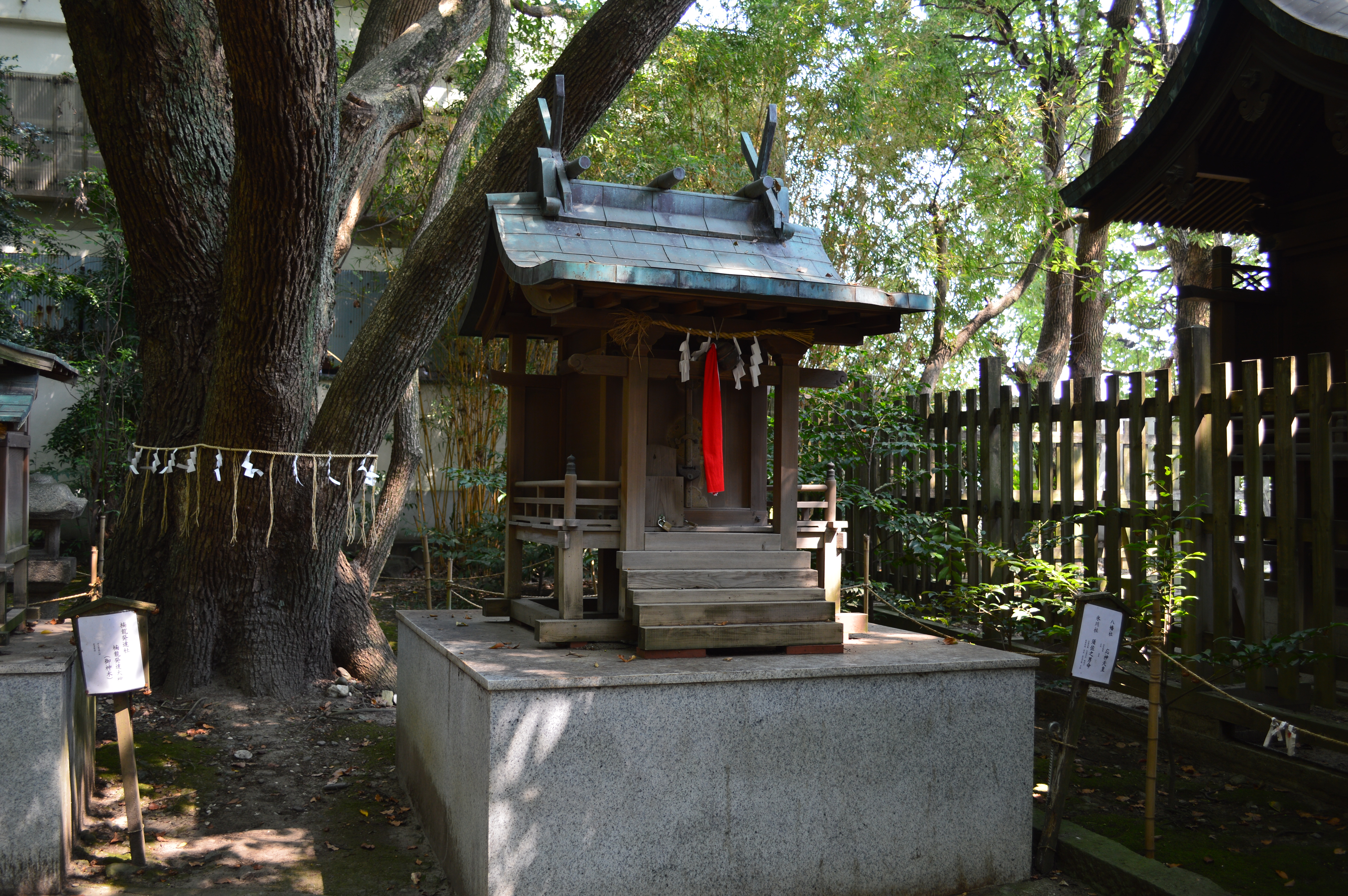 八幡社と氷川社 (刺田比古神社摂社)